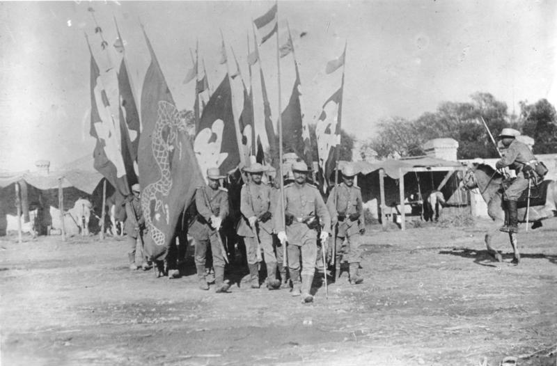 Boxeraufstand, 1. Ostasiatisches Infanterie-Regiment Zentralbild Der Boxeraufstand 1900/01. (Antiimperialistischer Volksaufstand gegen ausländische Aggressionsakte, der von dem "internationalen Expeditionskorps" von acht imperialistischen Staaten niedergeschlagen wurde). UBz: Soldaten des deutschen 1. Ostasiatischen Infanterie-Regiments mit den beim Sturm auf die Peitangforts eroberten Fahnen.